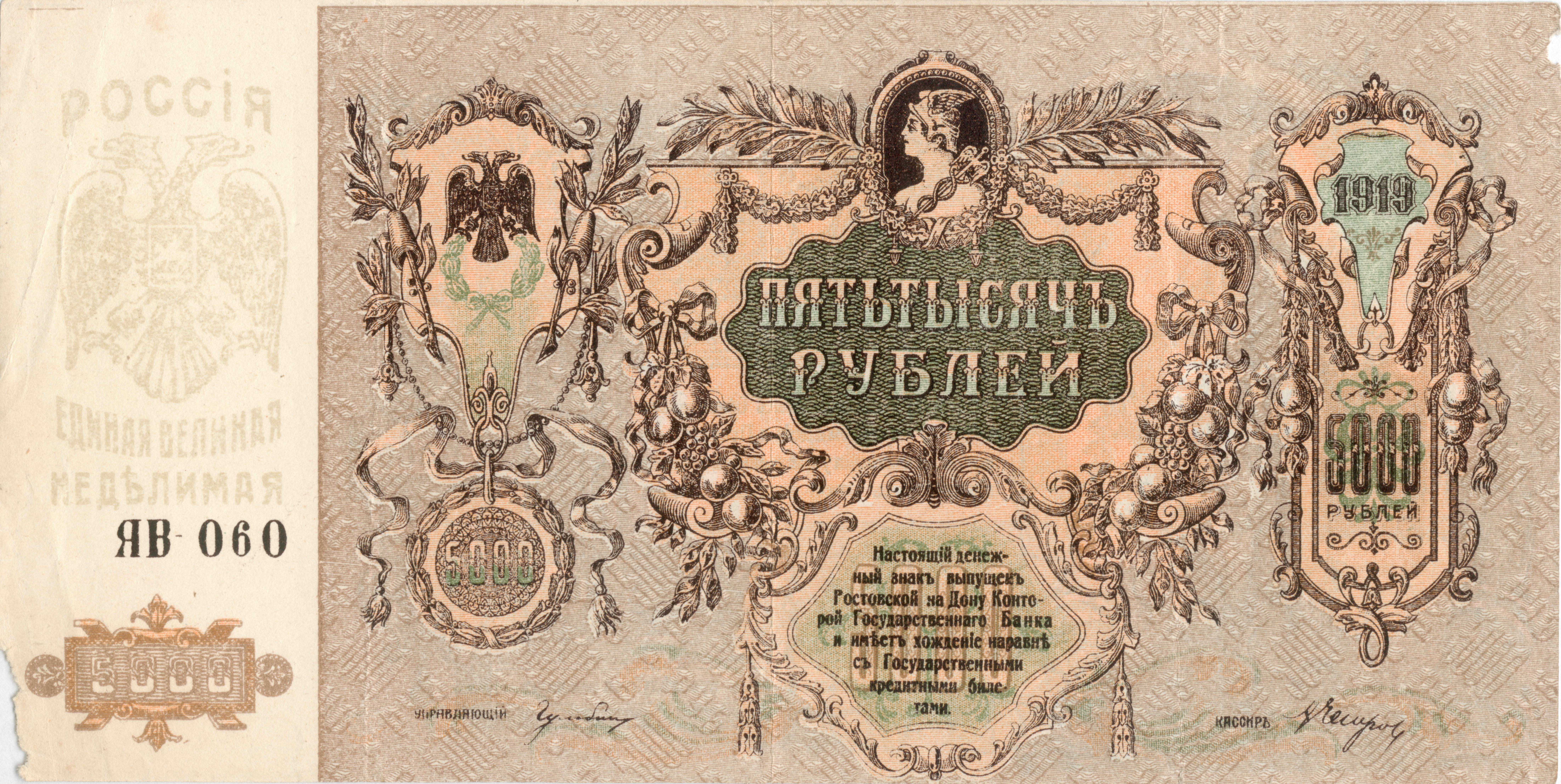 Донские деньги 5000 рублей. аверс. 1919. Ростов-на-Дону. Меловой знак на аллонже: РОССIЯ ЕДИНАЯ ВЕЛИКАЯ НЕДѢЛИМАЯ. Изображён Двуглавый орёл.